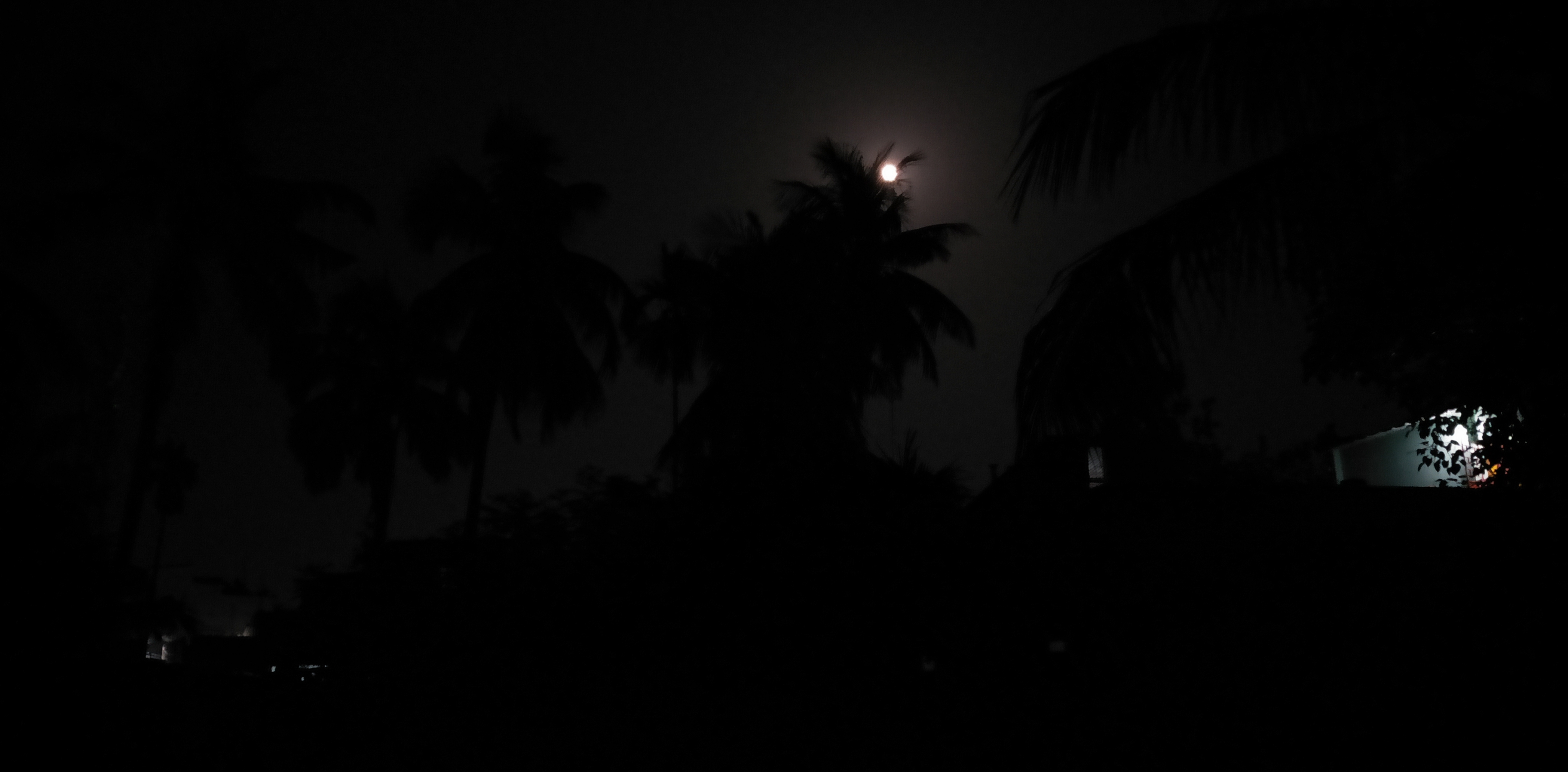 रात्रि के समय चाँद का दृश्य